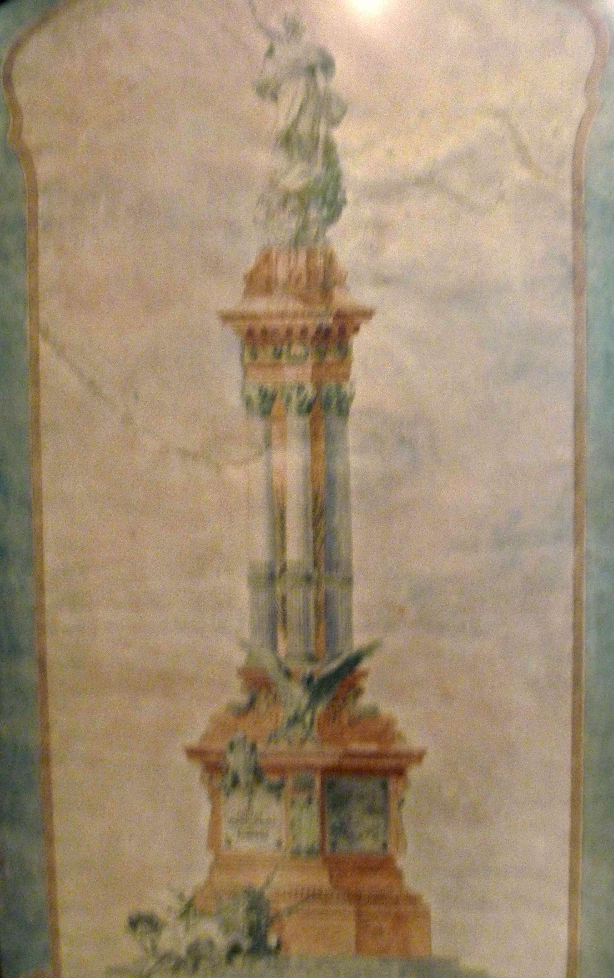 Boceto del proyecto del Monumento a los Próceres de la Independencia de 1809, por el arquitecto Lorenzo Durini Vasalli. Quito, 1905. Acuarela sobre papel. Colección Museo de la Ciudad.